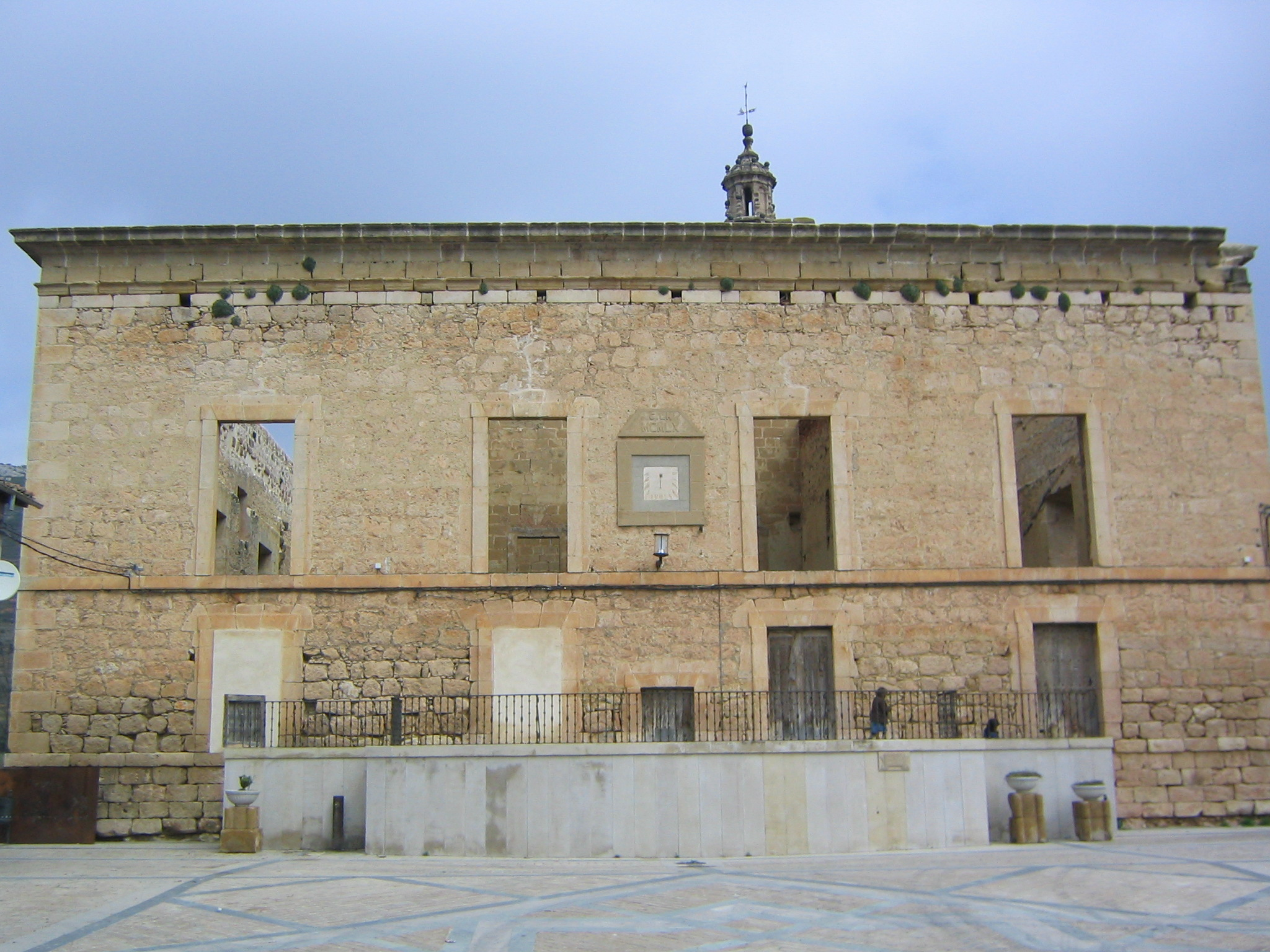 Palacio de los Condes de Oñate, en la localidad de Salinillas de Buradón, municipio de Labastida (Álava, España).